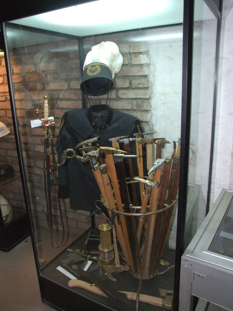 Subterranean skansen Guido in Zabrze - miners uniform and equipment